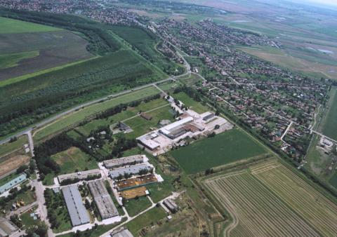 Tószeg, Hungary, aerialphotgraphy